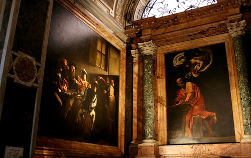 Chiesa di San Luigi dei Francesi, cappella Contarelli.